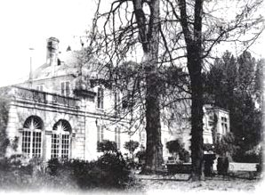 Façade du château du Marais à Argenteuil, totalement disparu depuis 70 ans. Photo d'une ancienne carte postale.